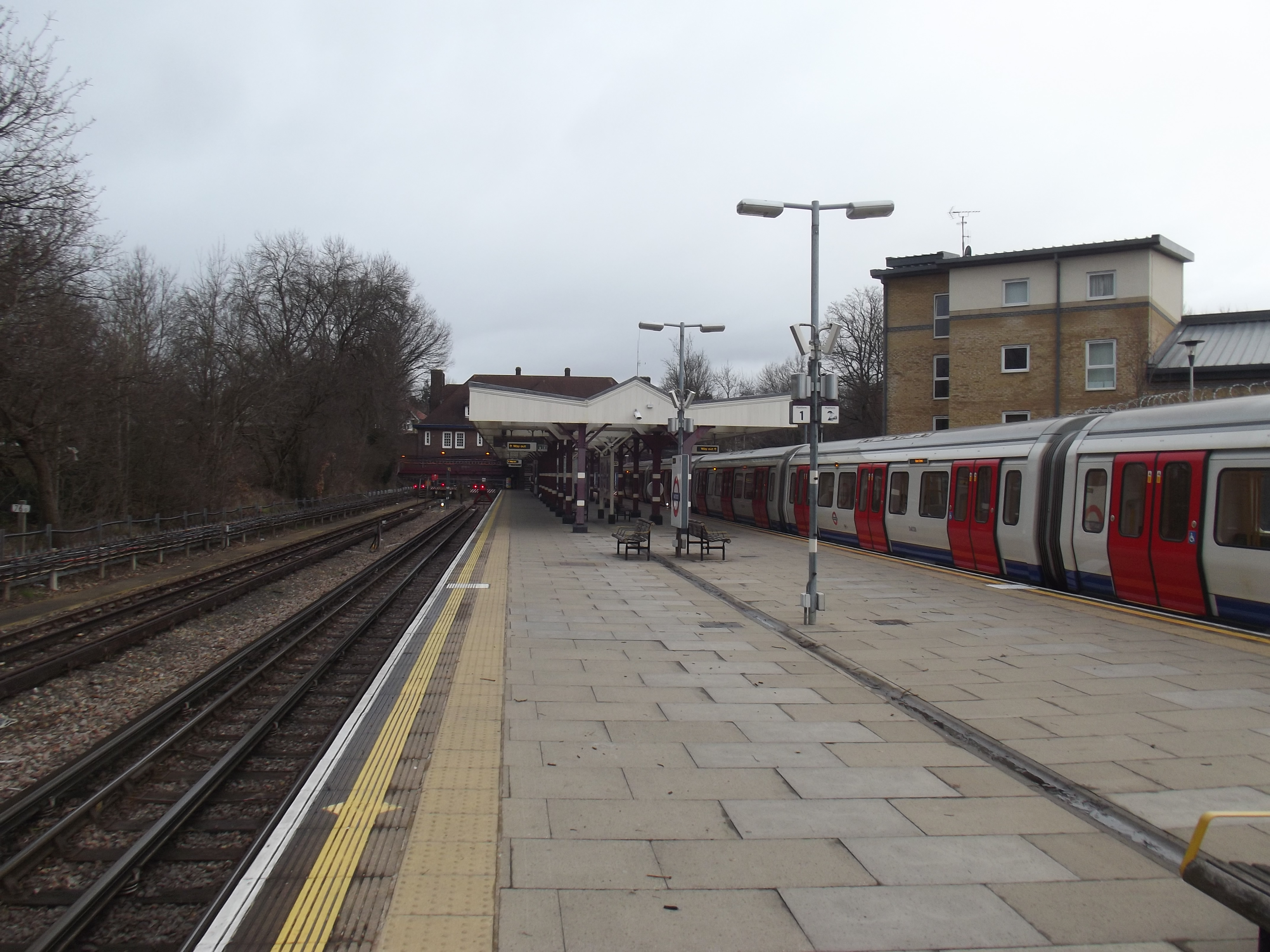 Het eindpunt van de Metropolitan line in Watford